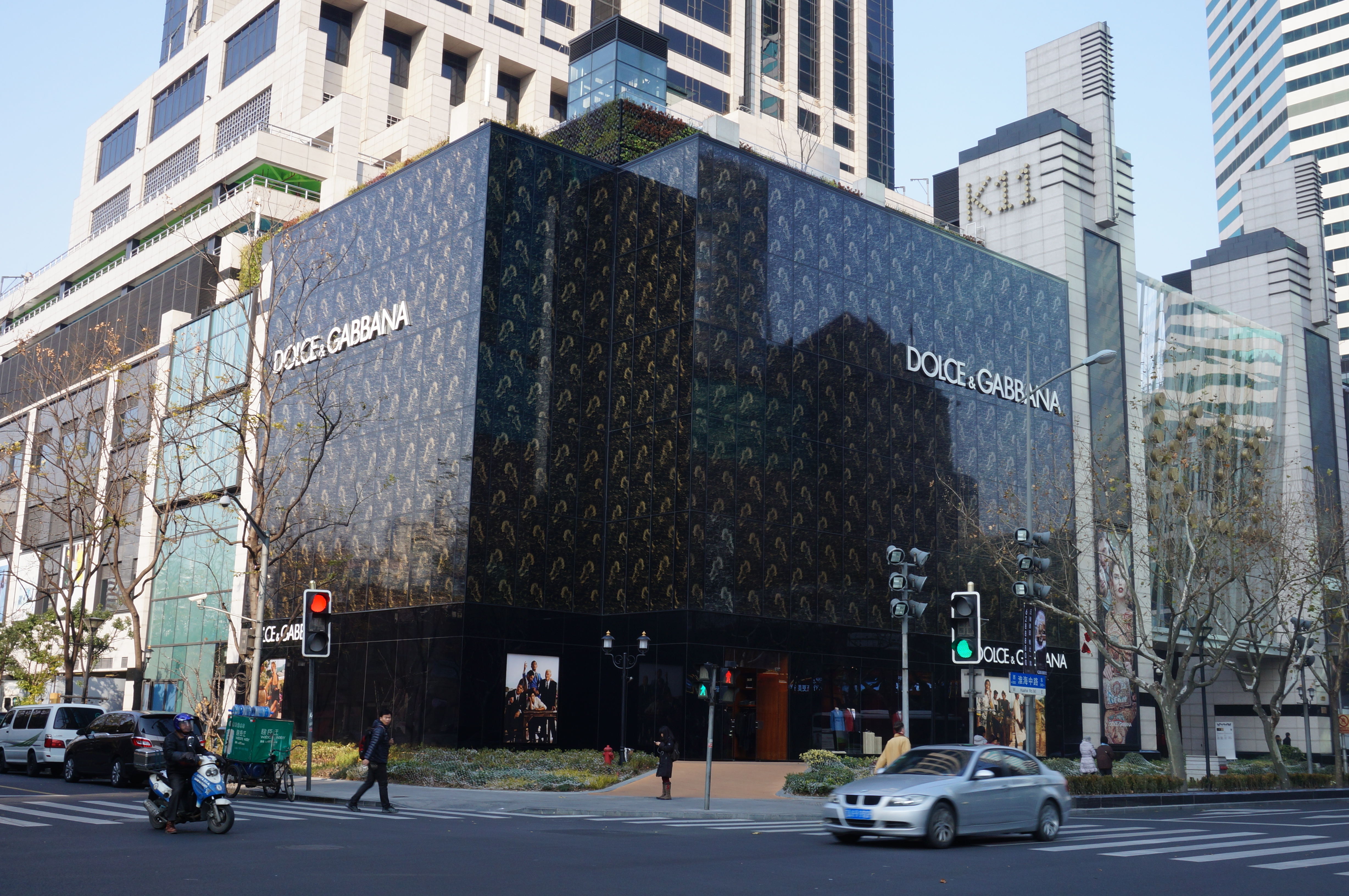 中文（中国大陆）: 上海的D&G分店